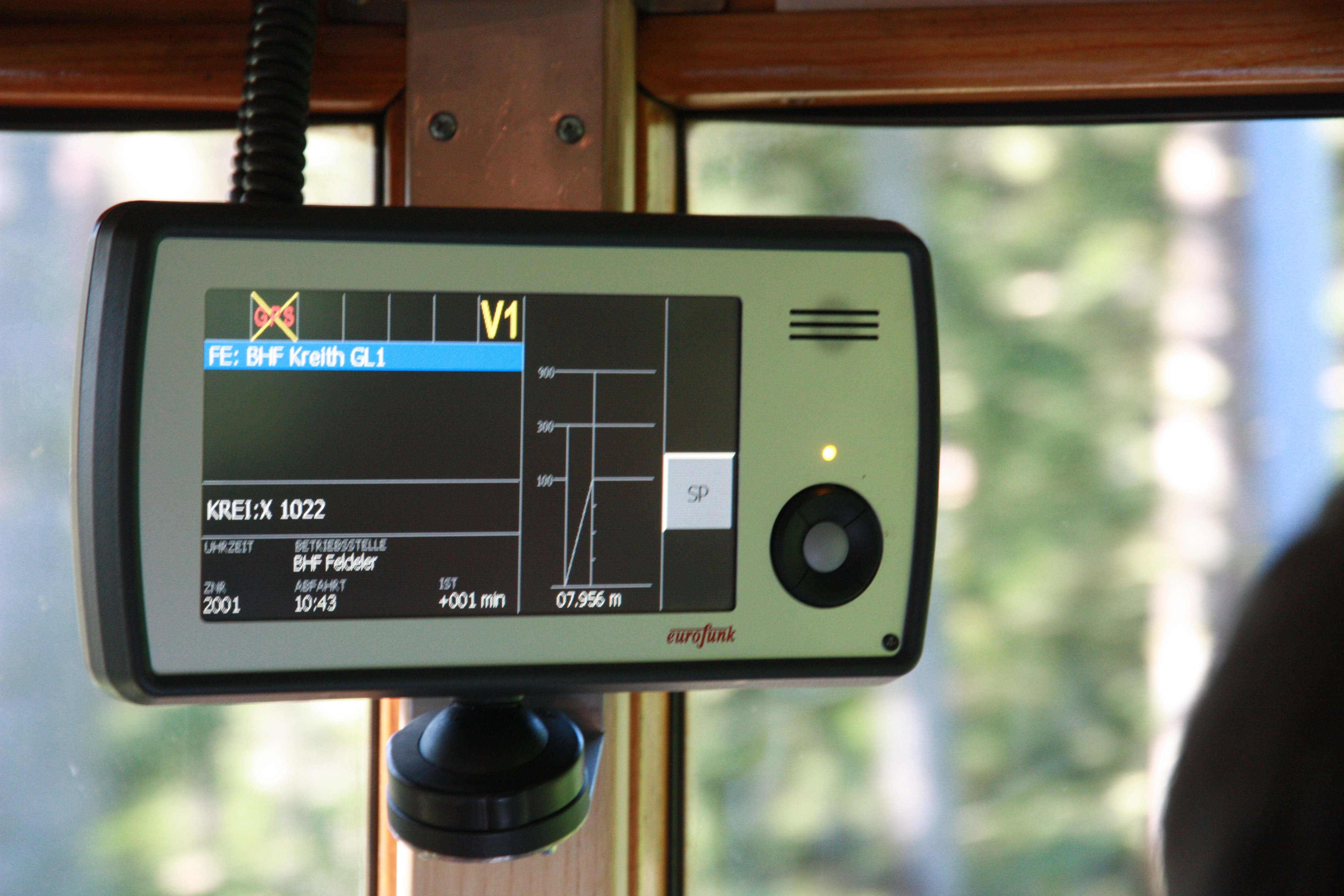 Zugleitsystem in TW3 (Haller-Triebwagen)